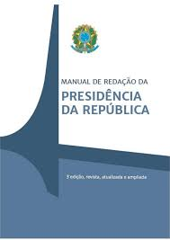 Capa oficial da terceira edição, em 2018, do Manual de Redação da Presidência da República.